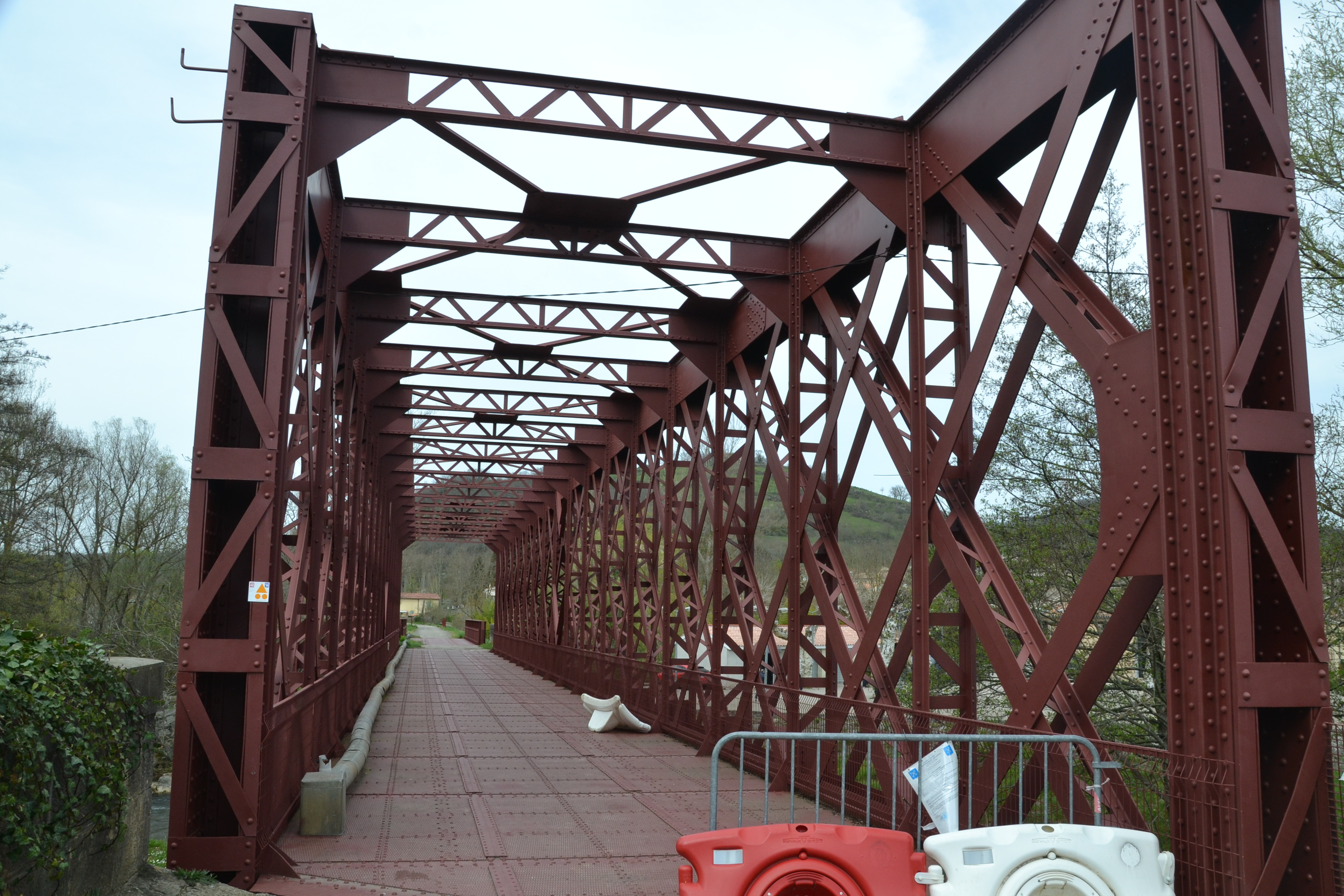 Ancien pont ferroviaire sur l'Hers et le Chalabreil à Chalabre (Aude, France).